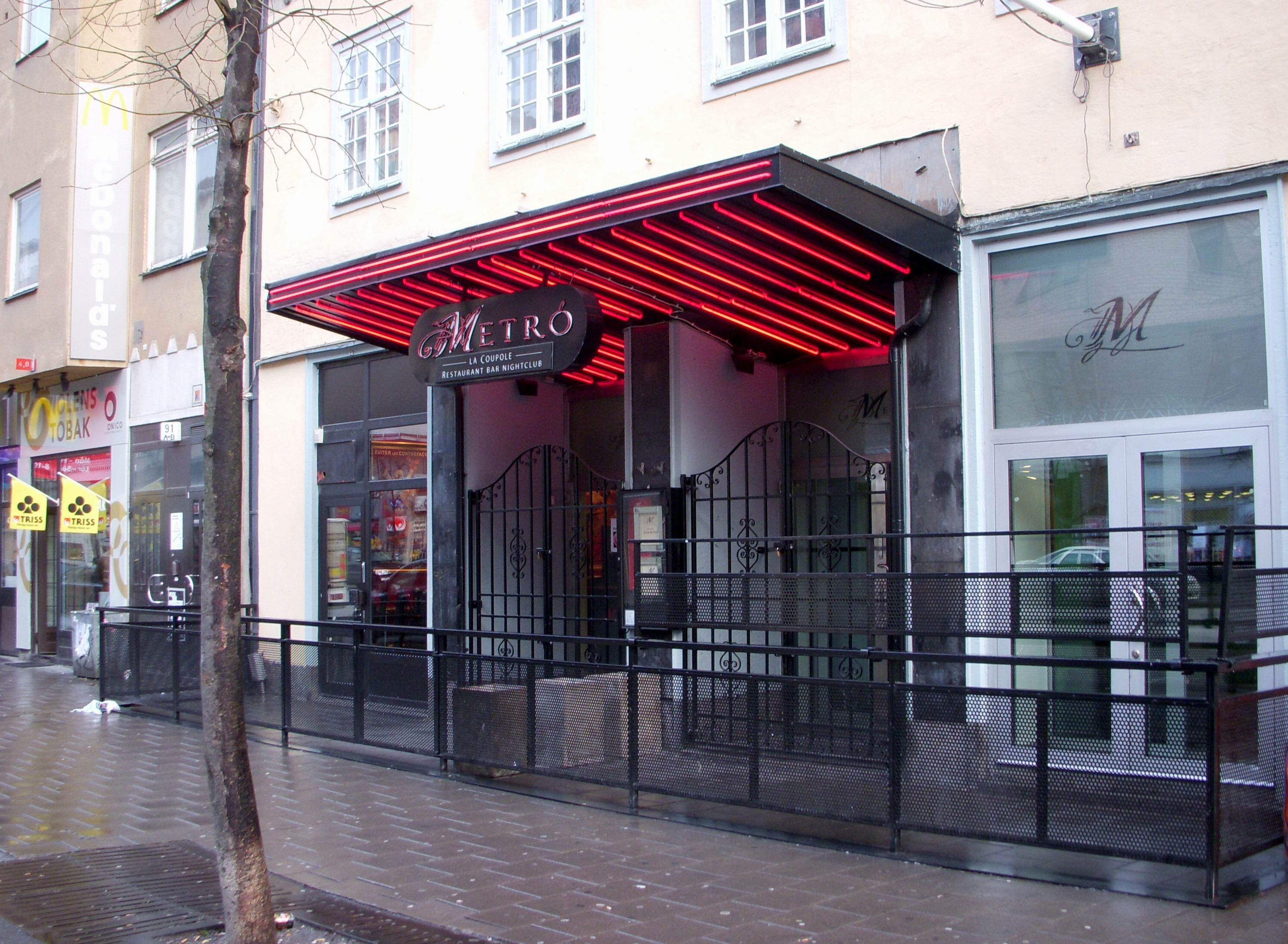 Före detta biografen Ringside (hette även Cora och Månen), Götgatan 93, Stockholm